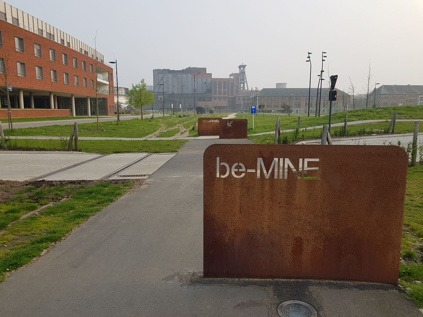 Het begin van het fietspad dat gelijk loopt met het kolenspoor van de koolmijnsite van Beringen.